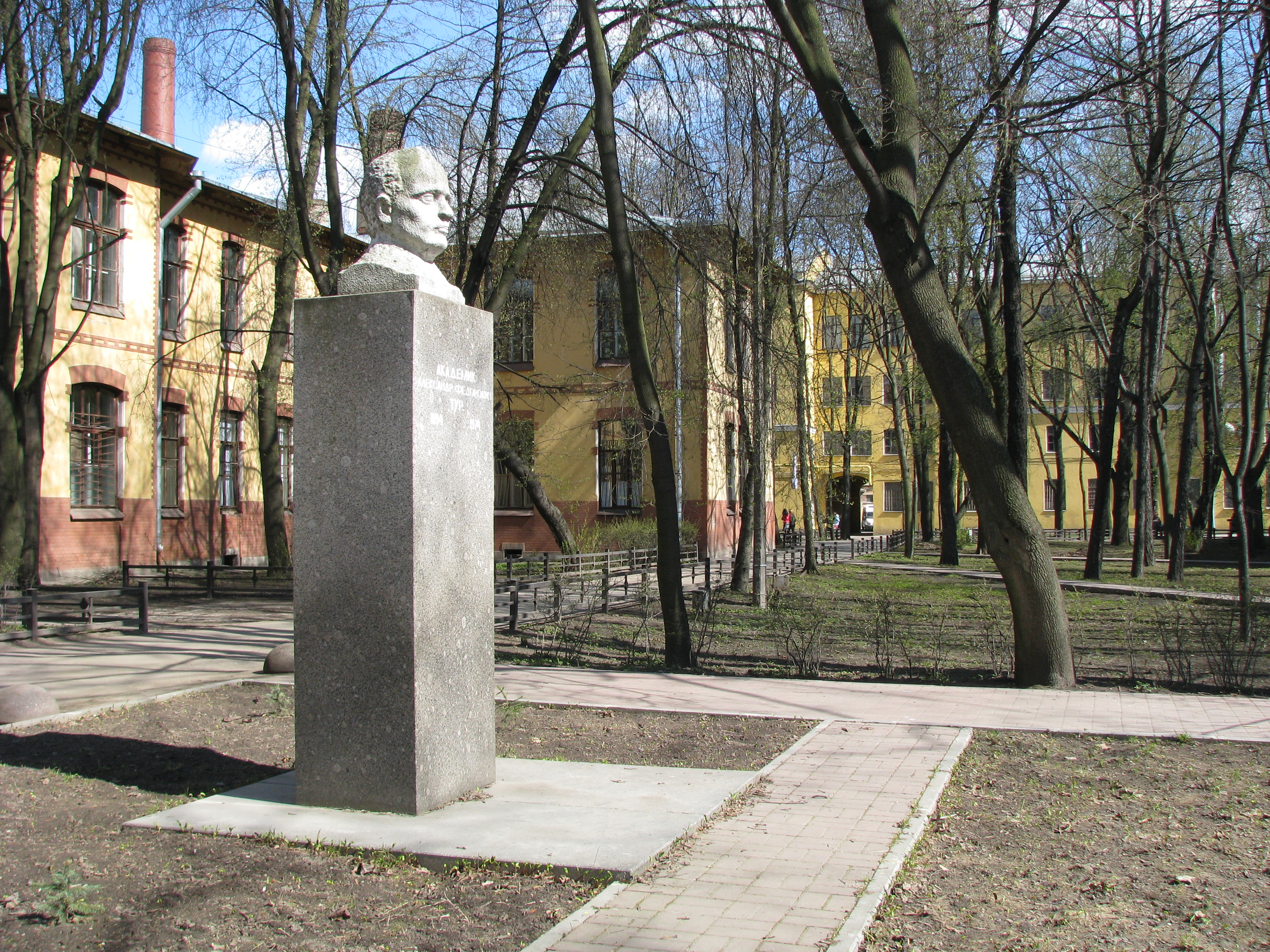 Памятник академику А. Ф. Туру на территории СПбГПМА